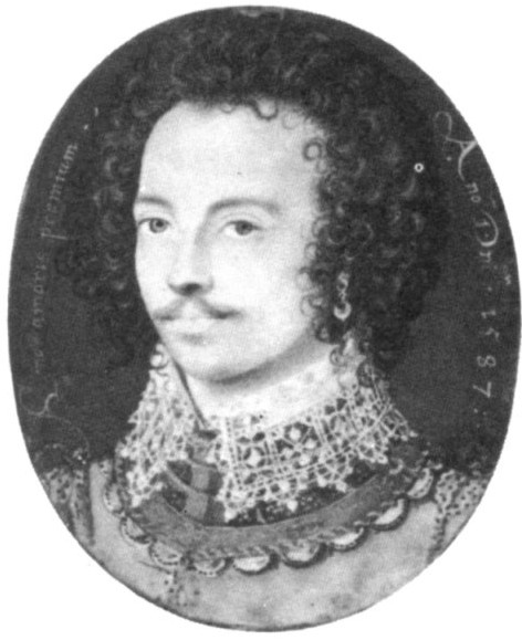 Charles Blount (1563-1606)